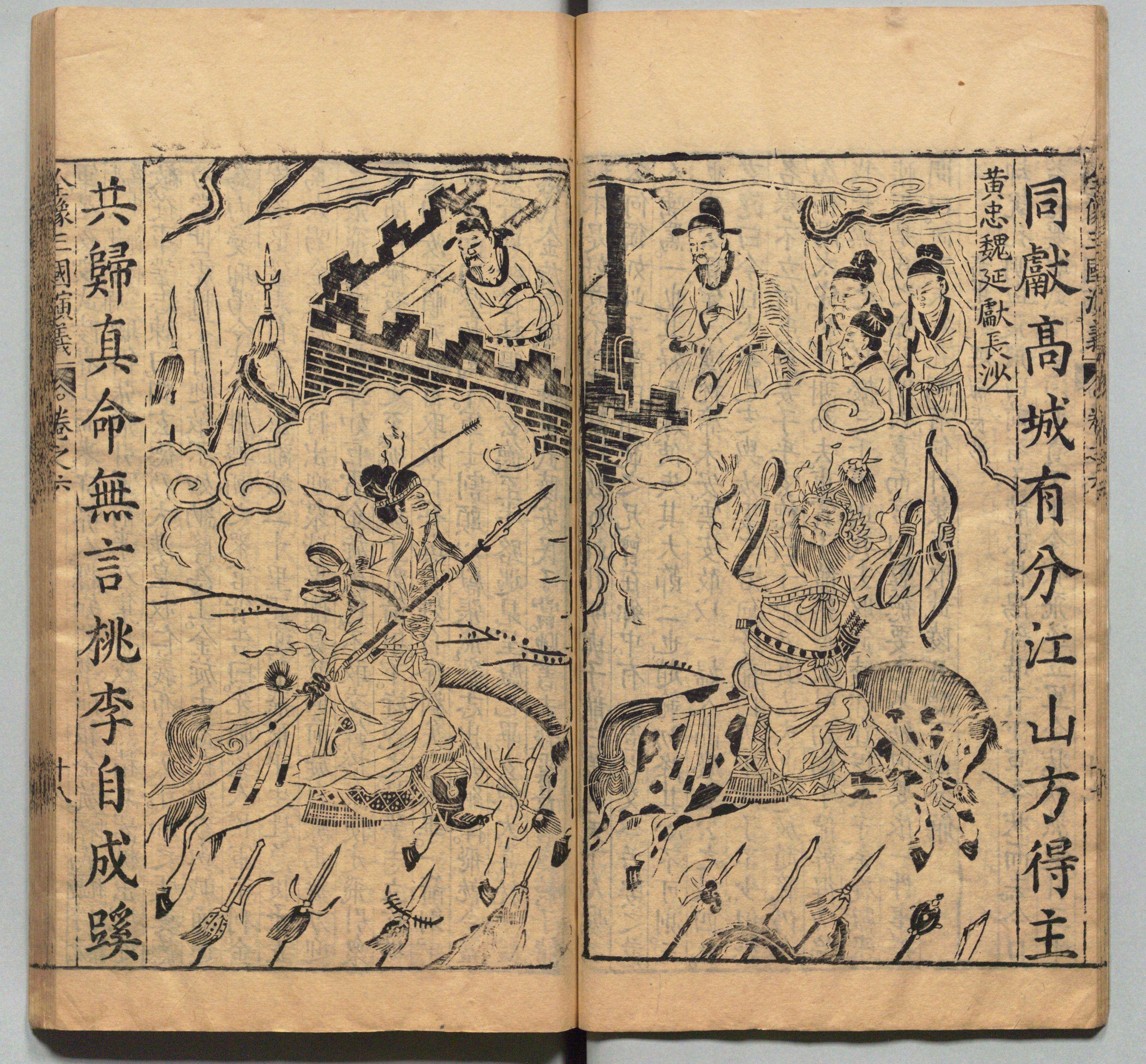 新刊校正古本大字音释三国志通俗演义 明万历十九年书林周曰校刊本